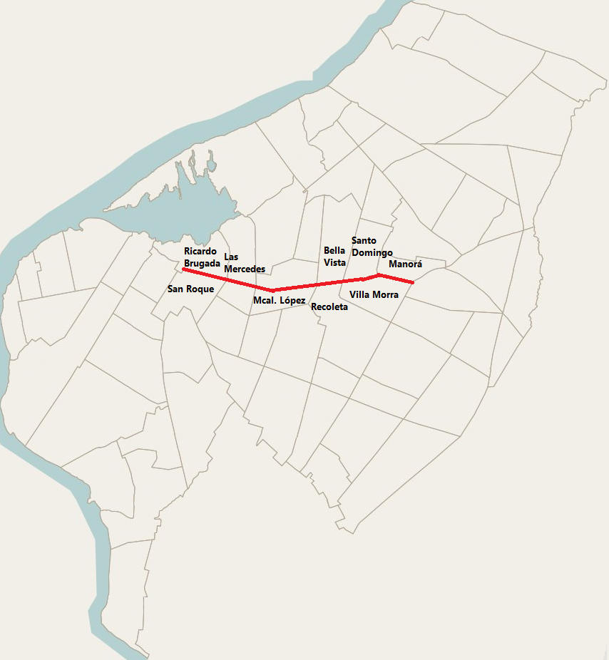 Mapa de la Avda. España en Asunción, Paraguay